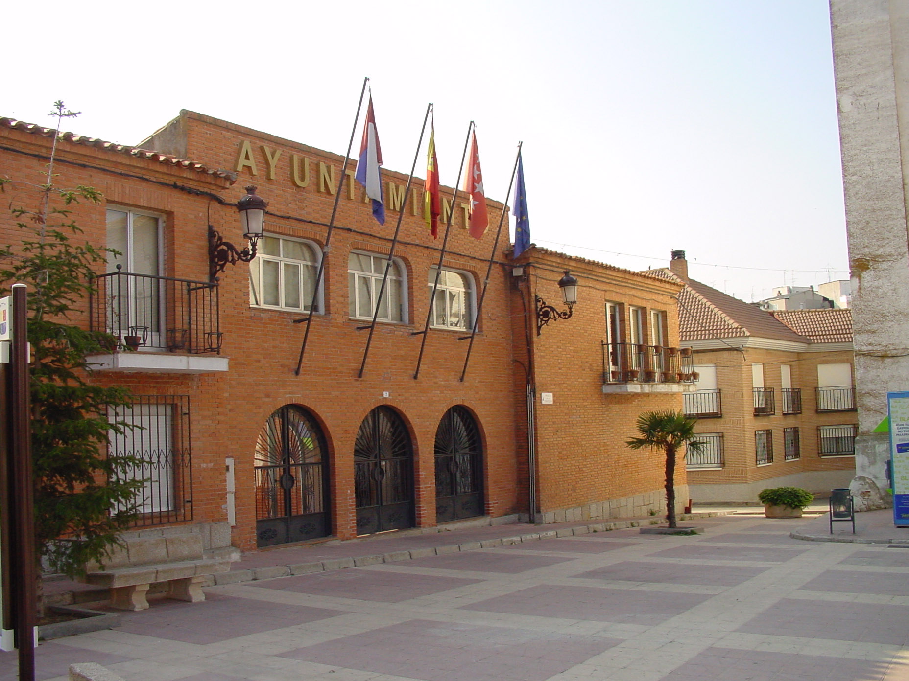 Ayuntamiento de Algete.